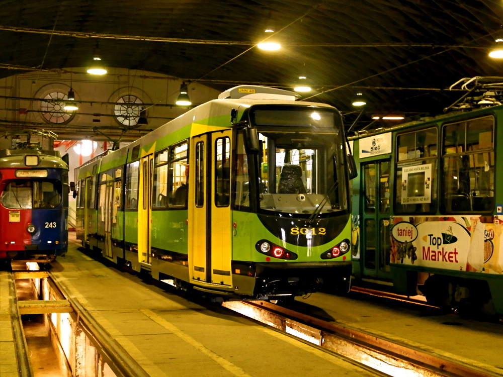 Pierwszy z dwóch zmodernizowanych Duewagów M8C w Elblągu